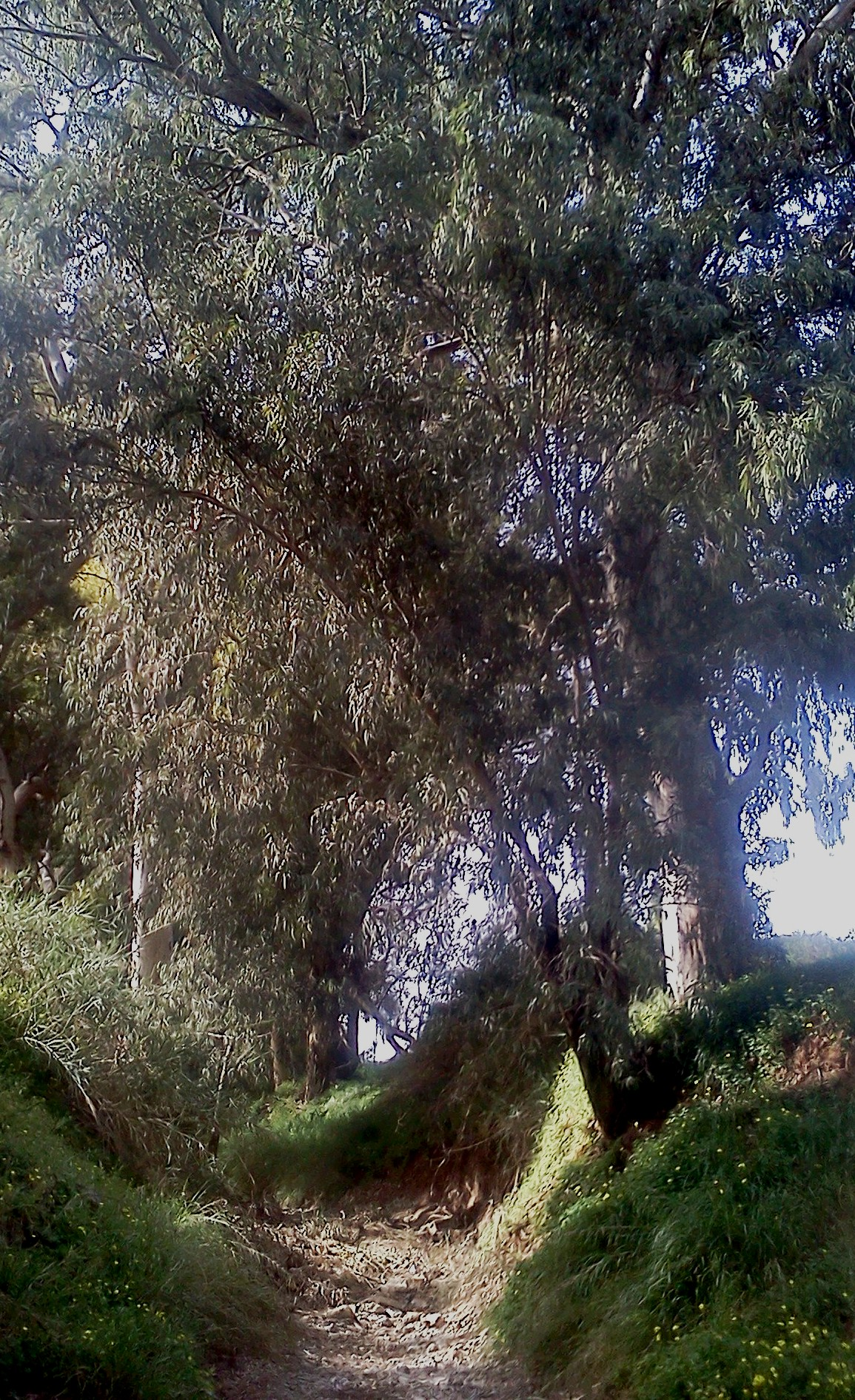 ערוץ הזרימה בנחל עזר